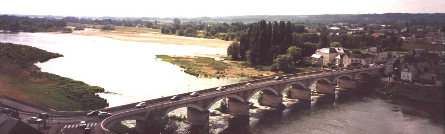 D'Loire zu Amboise